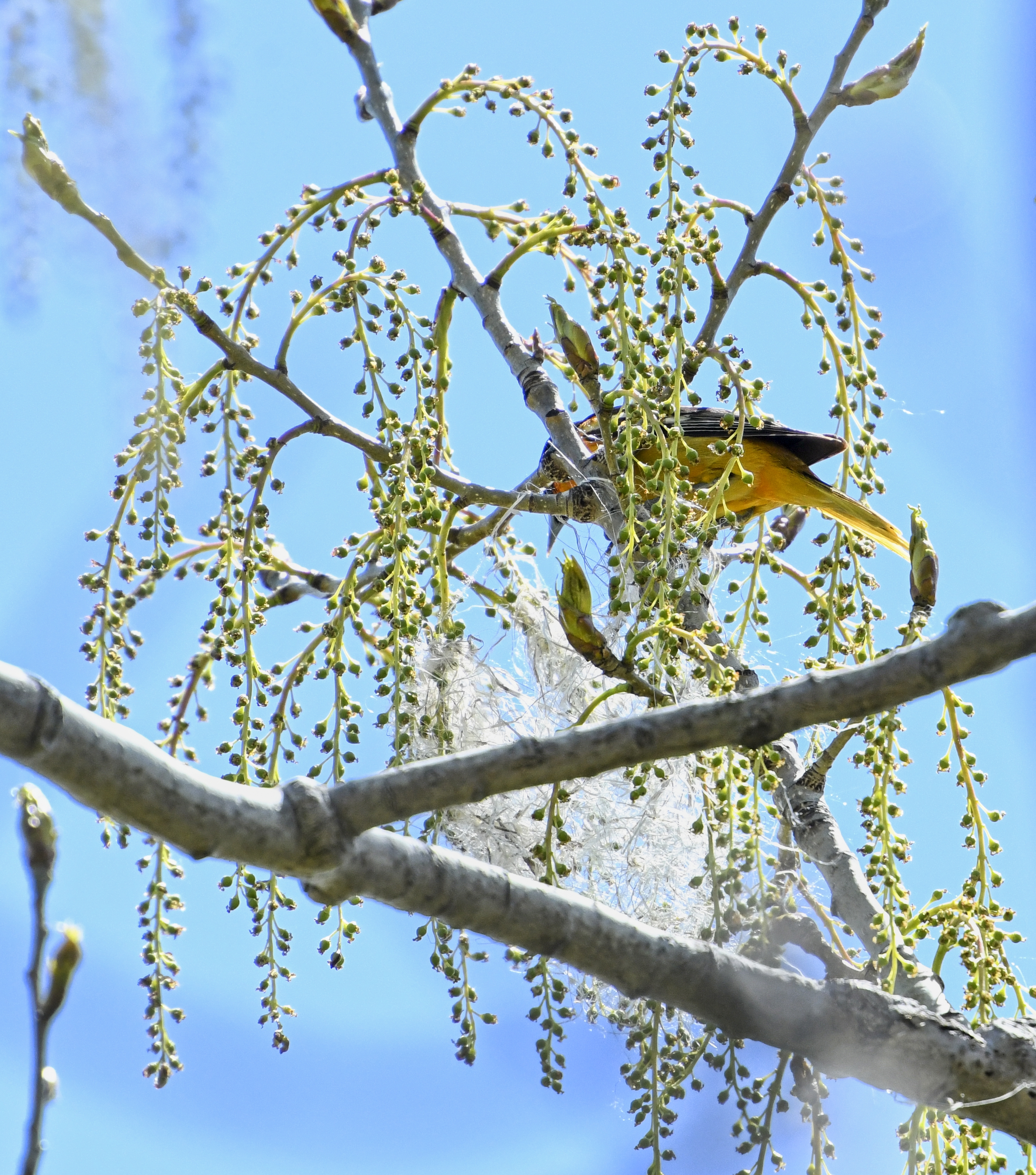 Трупіал балтиморський (Icterus galbula) влаштовує гніздо у парку Полковника Семюела Сміта в Торонто